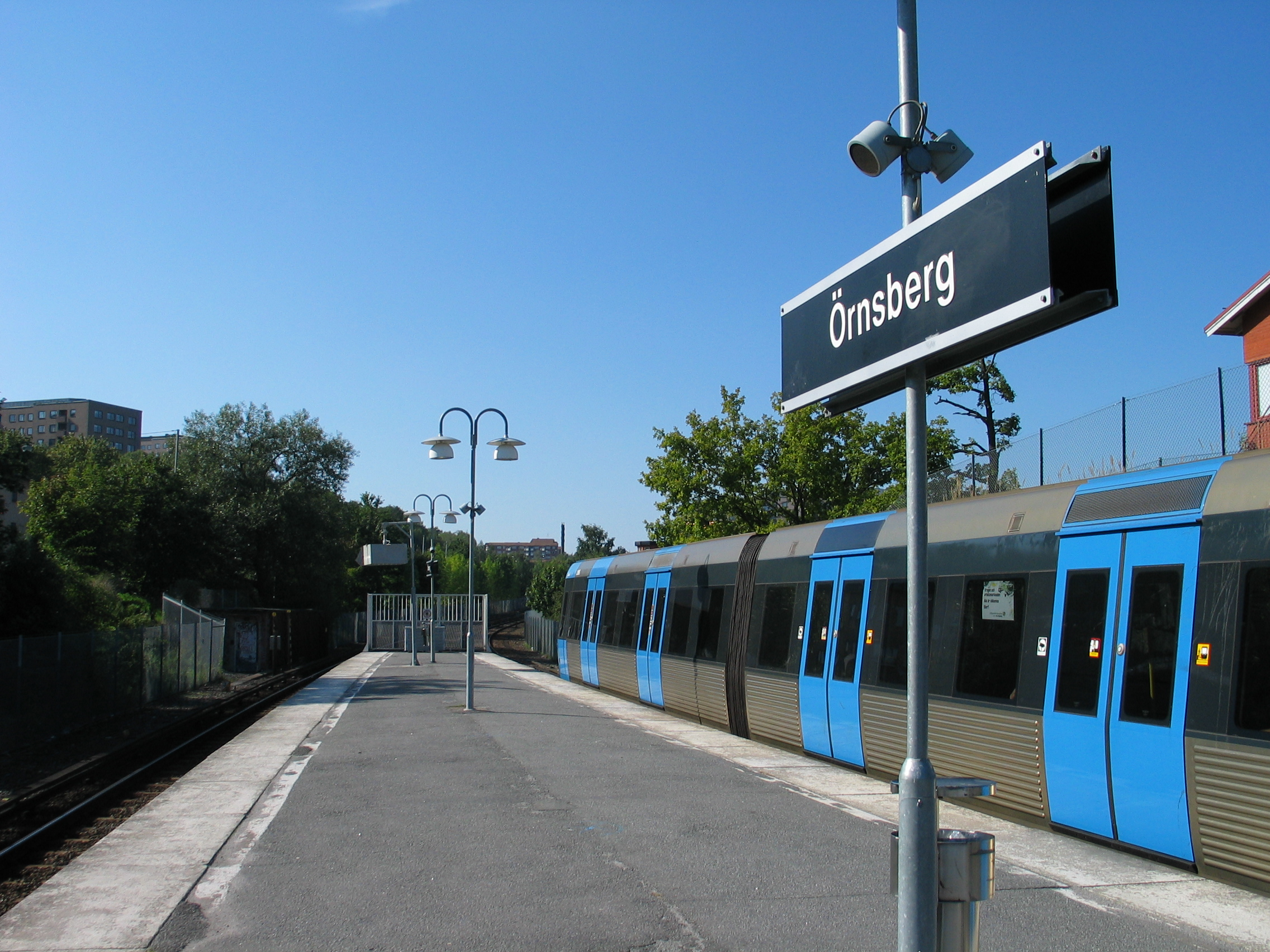 Örnsberg, a metro station in Stockholm, Sweden.